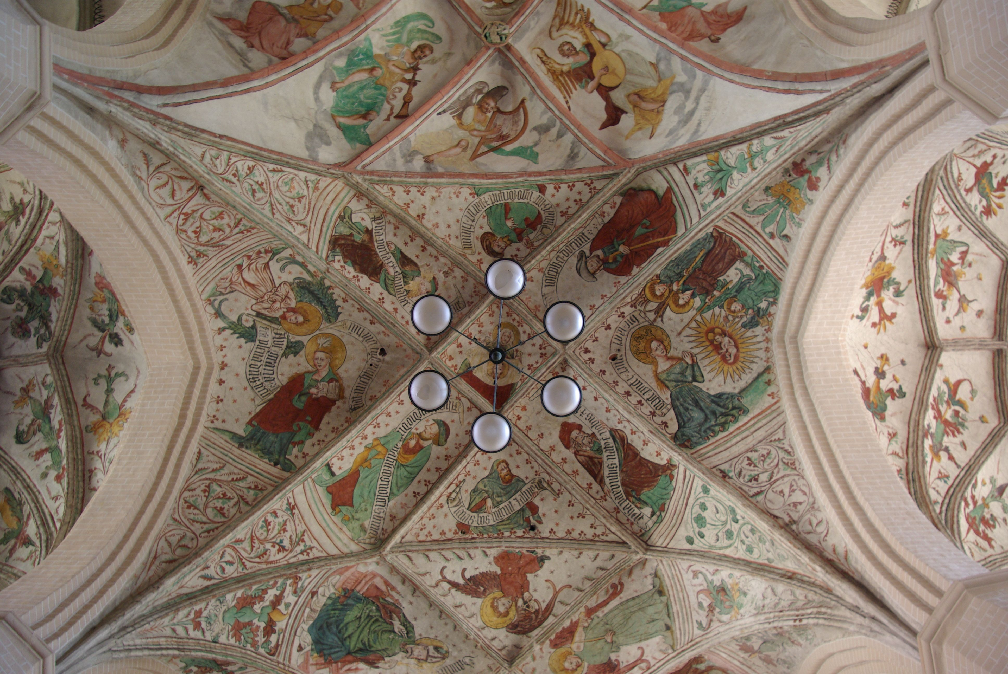 Herzberg / Elster in Brandenburg. Die Deckengemälde stammen aus der Zeit von 1410 bis 1425. Zu sehen ist (Anfang oben, im Uhrzeigersinn): Jesaja, Prophet, Geburt und Anbetung, Joseh, Hesekiel, Verkündigung Mariae und Prophet. In der Mitte ist Veronika dargestellt.